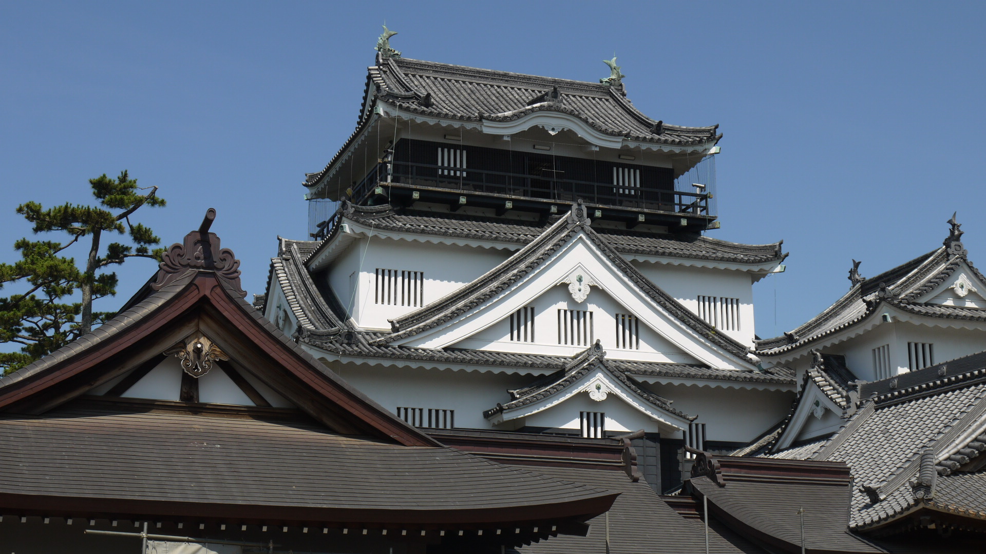 Okazaki Castle 岡崎城3